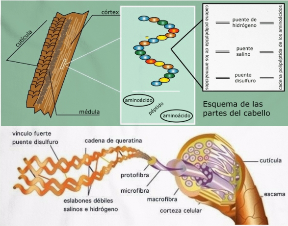 Proceso de keratina en el cabello